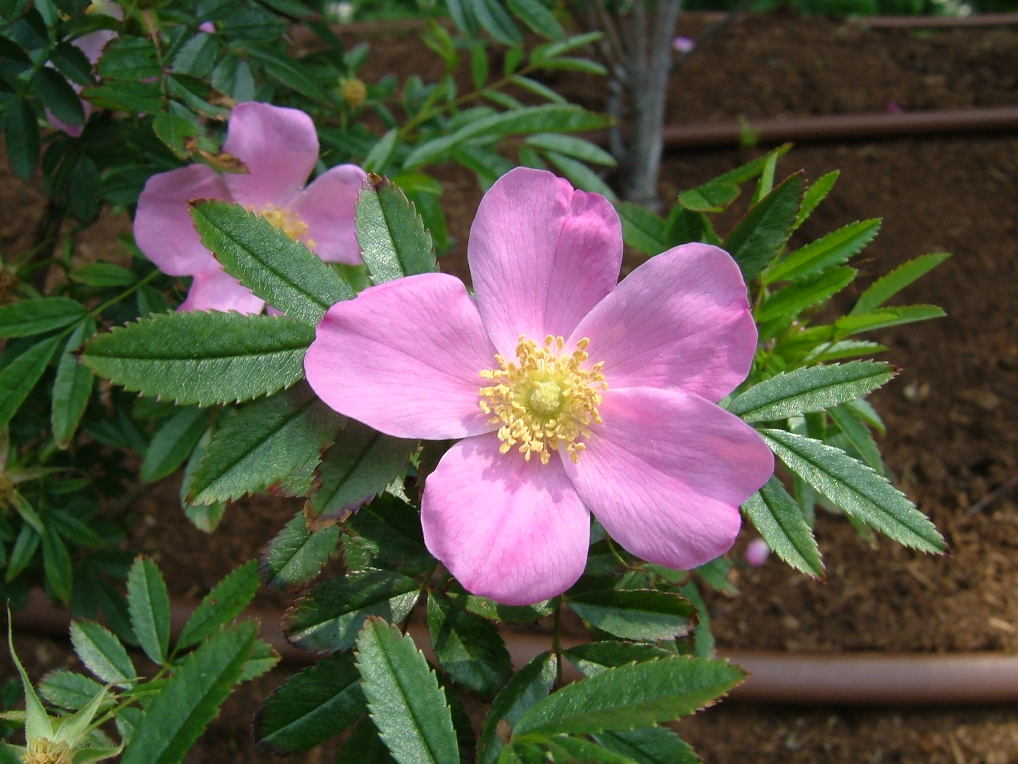 ロサ 二ティダ Rosa nitida